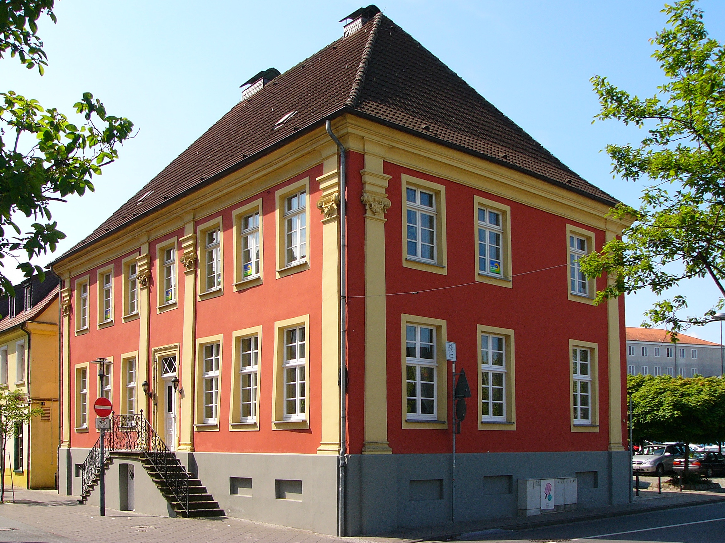 barockes Bürgerhaus Vorschulze This is a photograph of an architectural monument., no. 56